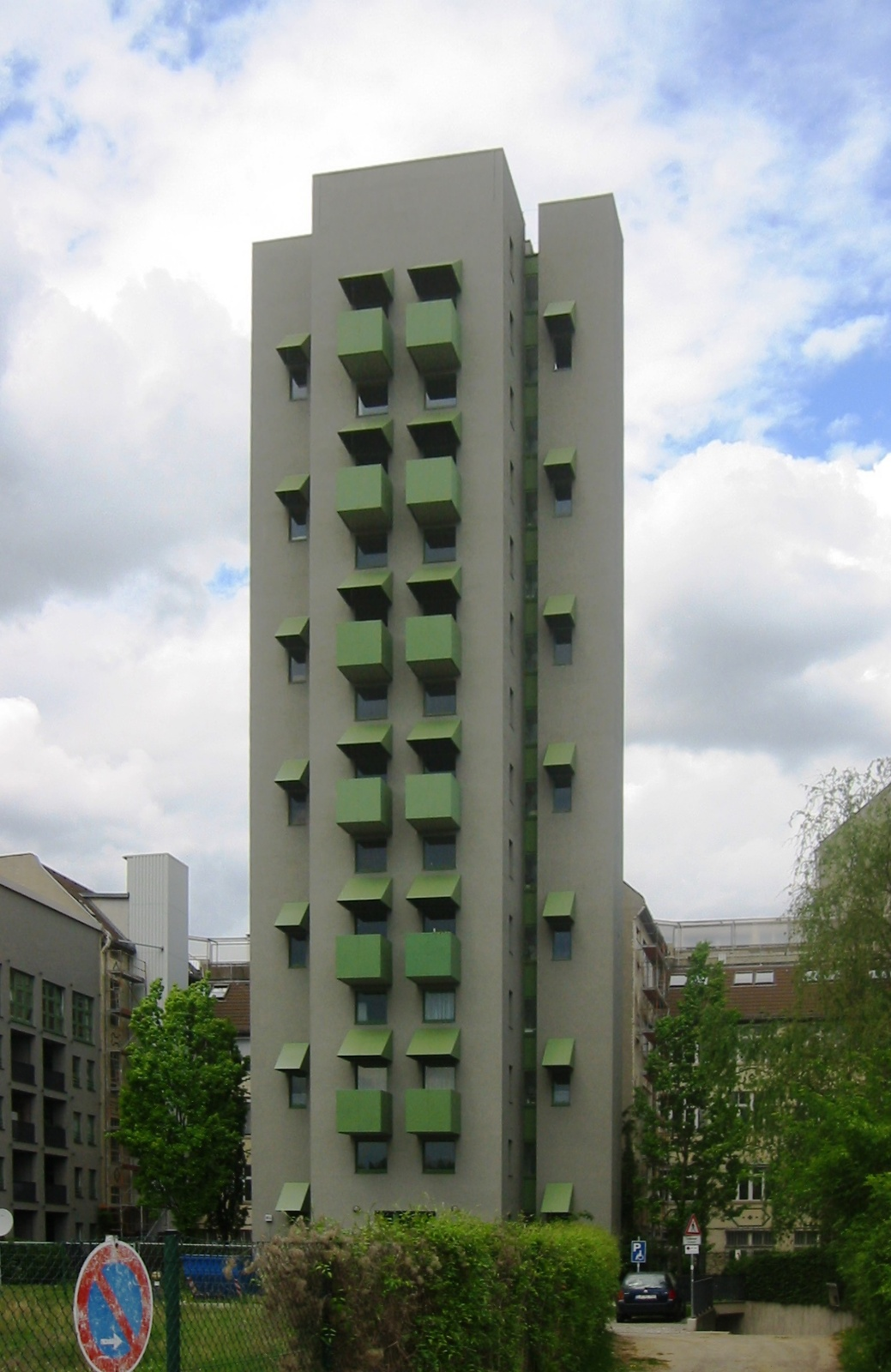 John Hejduk: Věž v Kreuzbergu, Berlín, Německo